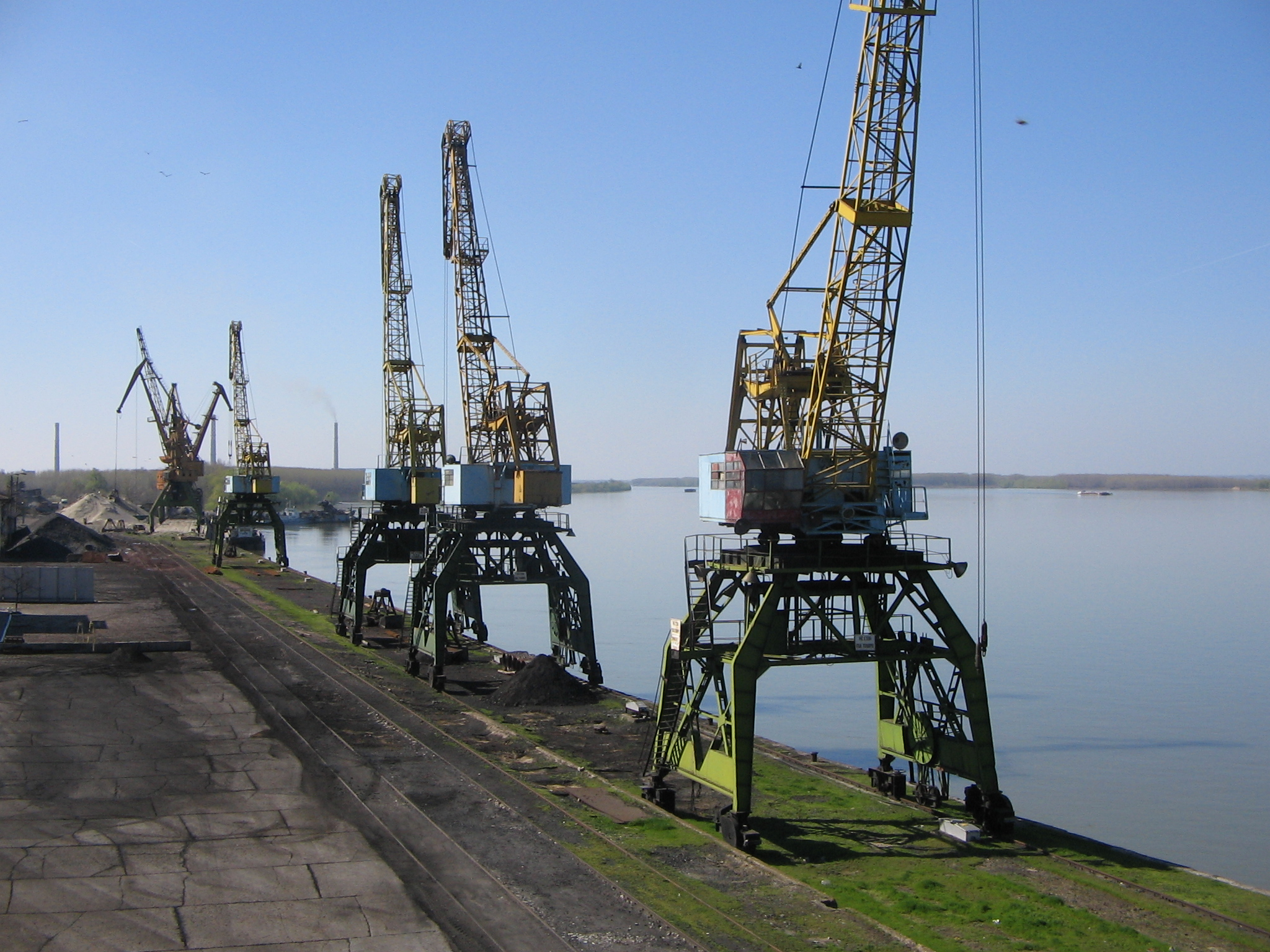 изглед от пристанище Свищов